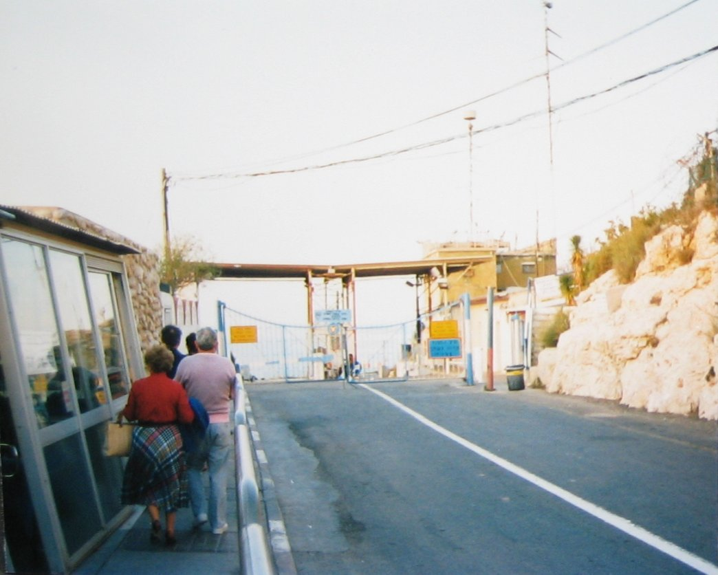 grens tussen libanon en israel